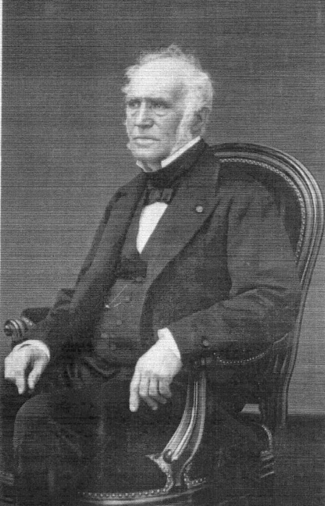 Jules Alexandre Collart-Dutilleul (1790-1865), Procureur Général de la Cours des Compte